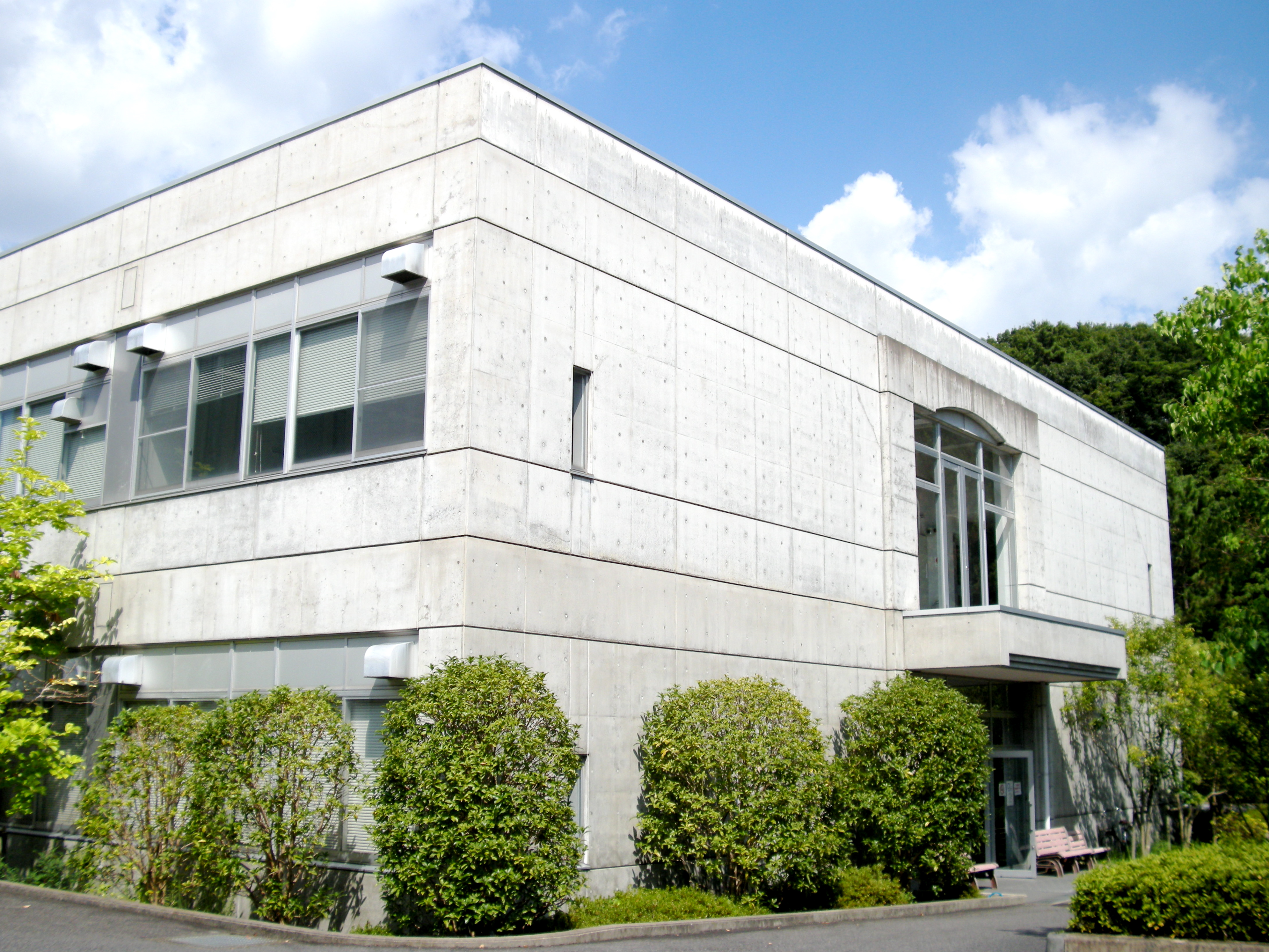 EXL-3 (Biwako Kusatsu Campus, Ritsumeikan University, Japan)